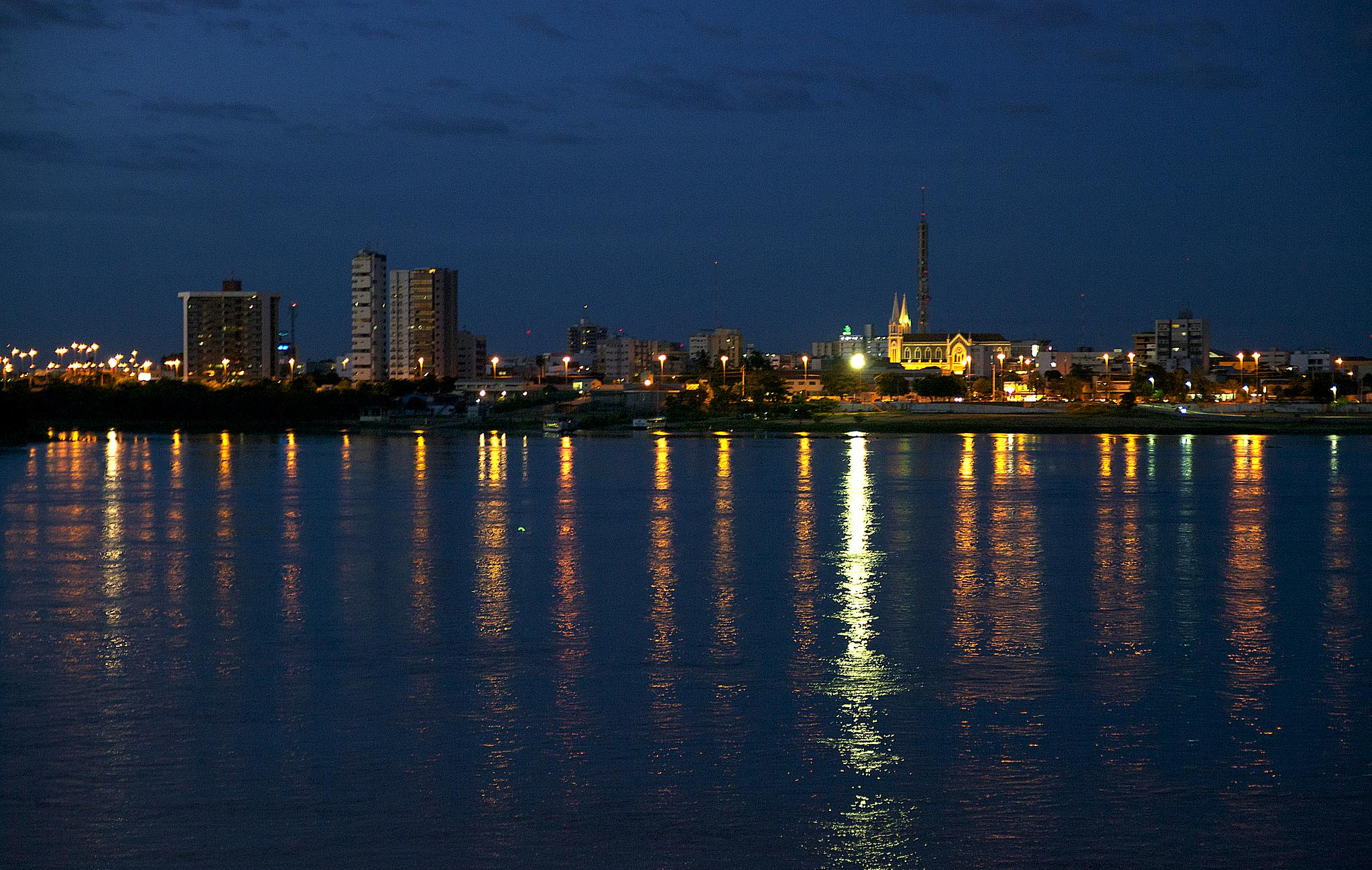 Parte da Orla I de Petrolina-PE, a partir da orla de Juazeiro-BA.